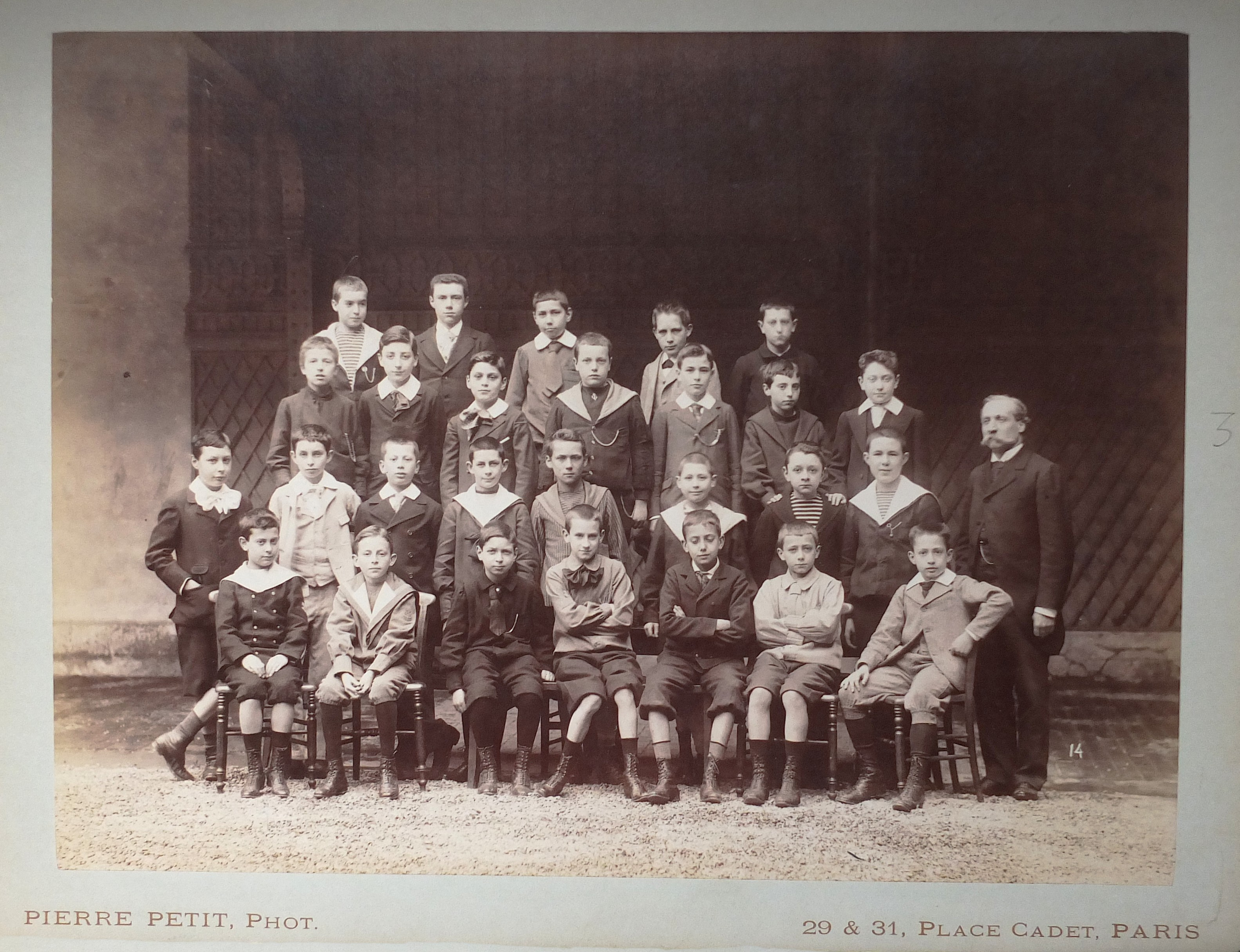 Collège du Petit Lycée Condorcet, rue d'Amsterdam, Paris, classe de 5ème, 1897. Premier rang, premier à gauche Pierre. Photo de Pierre Petit. Collection particulière du déposant, cliché papier sépia, 19 cm x 25,5 cm.